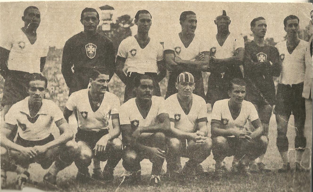 Brasil 2 - 2 Argentina Copa Roca - Parque Antarctica - Da esquerda para a direita: Em pé - Argemiro, Jurandir, Junqueira, Zazur, Jaú, Aymoré Moreira e Afonsinho. Agachados: Carreiro, Tim, Leônidas da Silva, Romeu Pellicciari e Adilson.